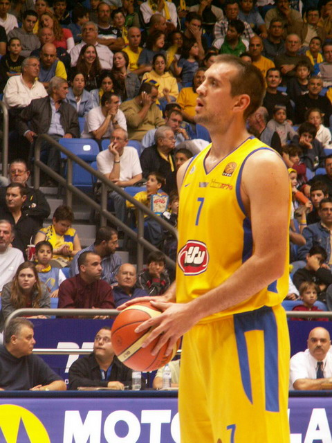 ניקולה וויצ'יץ'